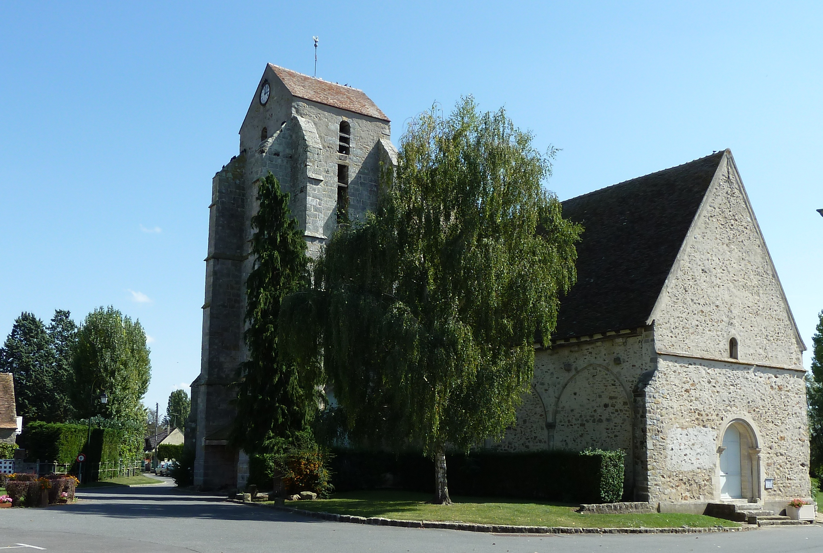 Église Saint-Laurent du XIIè, XIIIè siècle. Elle a été édifiée sur les ruines d'une ancienne chapelle.